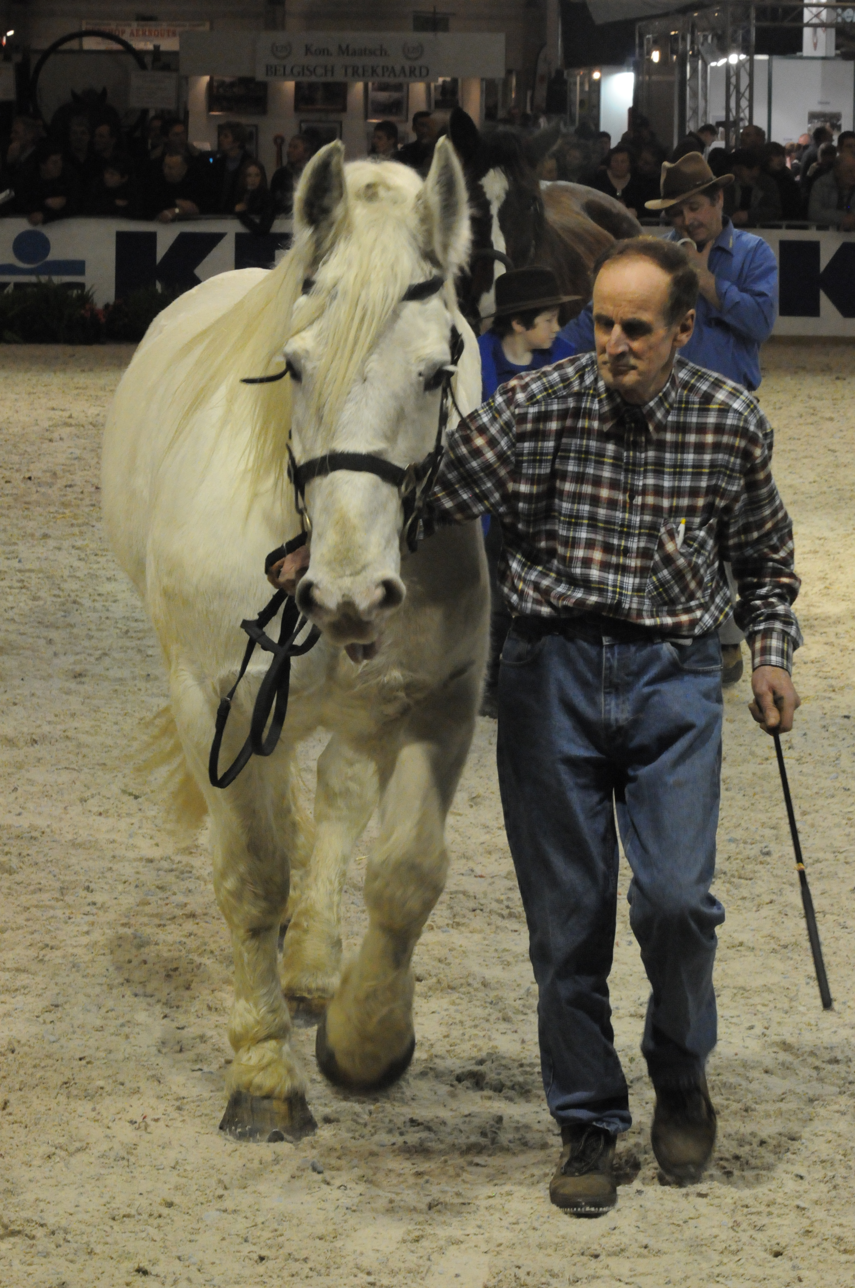 Boulonnais